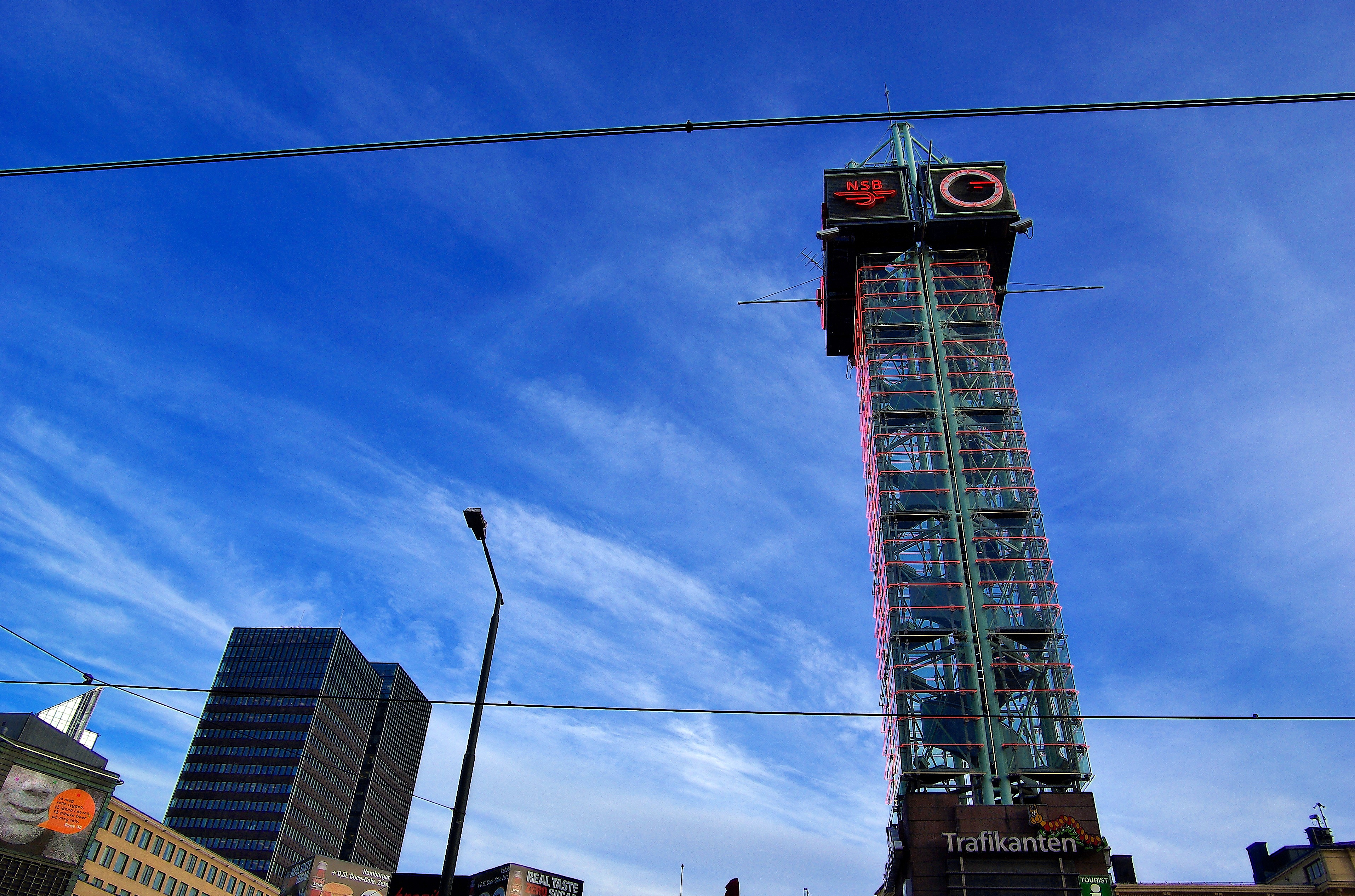 Trafikanten, Oslo, Norway.